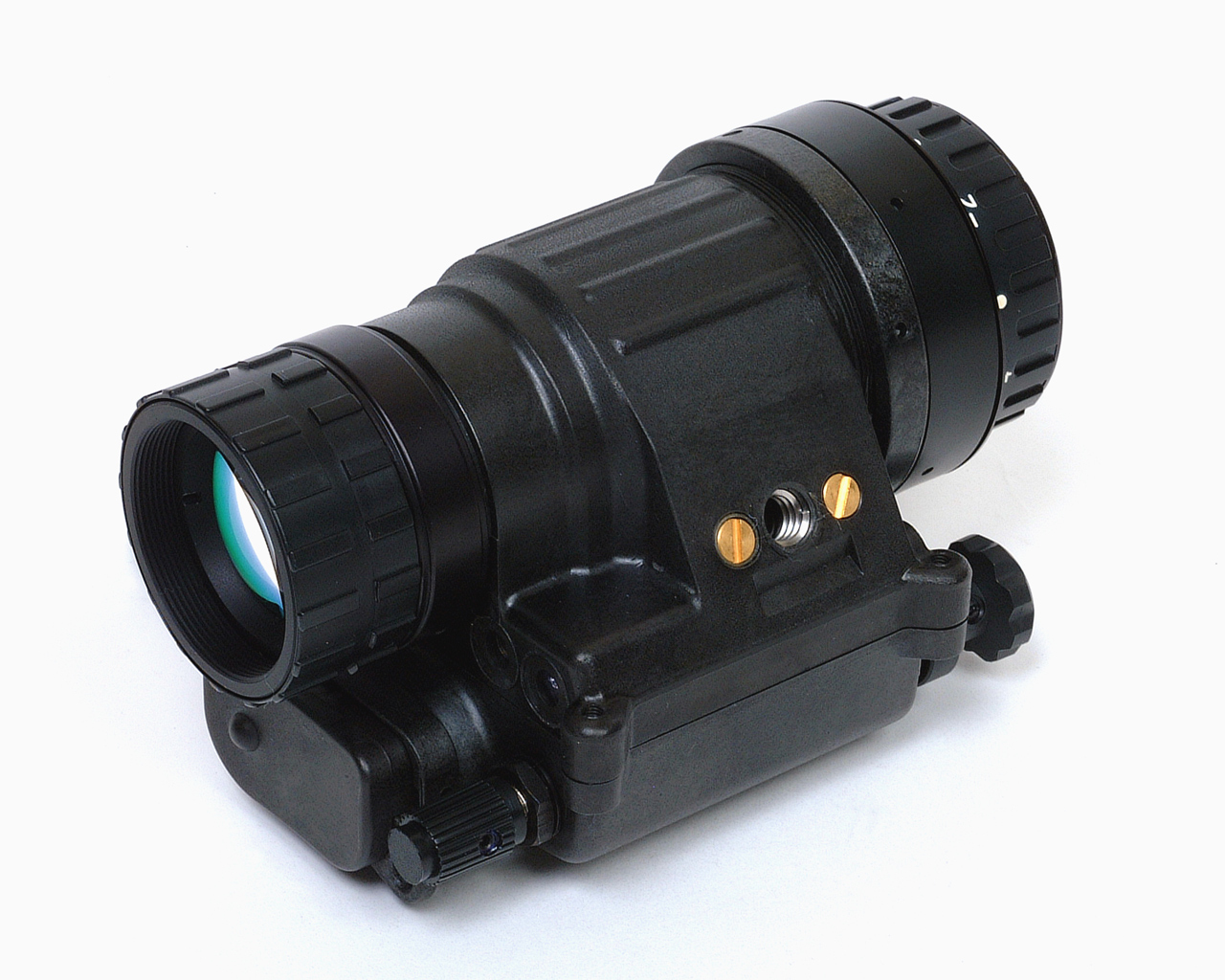 略称：JGVS-V8 [方式]微光暗視 [本体全幅]65mm [本体高さ]70mm [本体奥行き]120mm [本体重量]310g [製作]日本電気